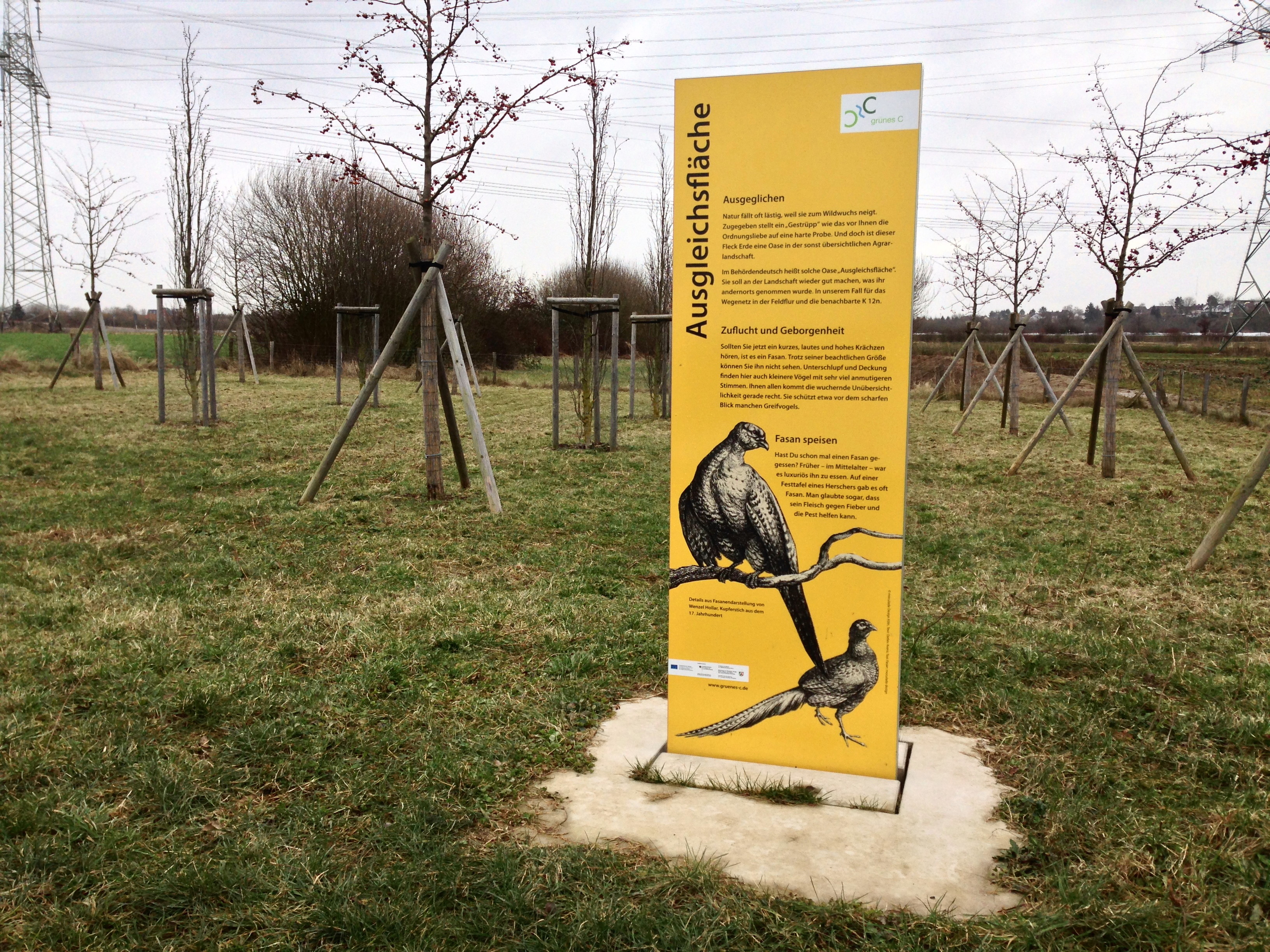 Infotafel „Ausgleichsfläche“ in Alfter, Rhein-Sieg-Kreis